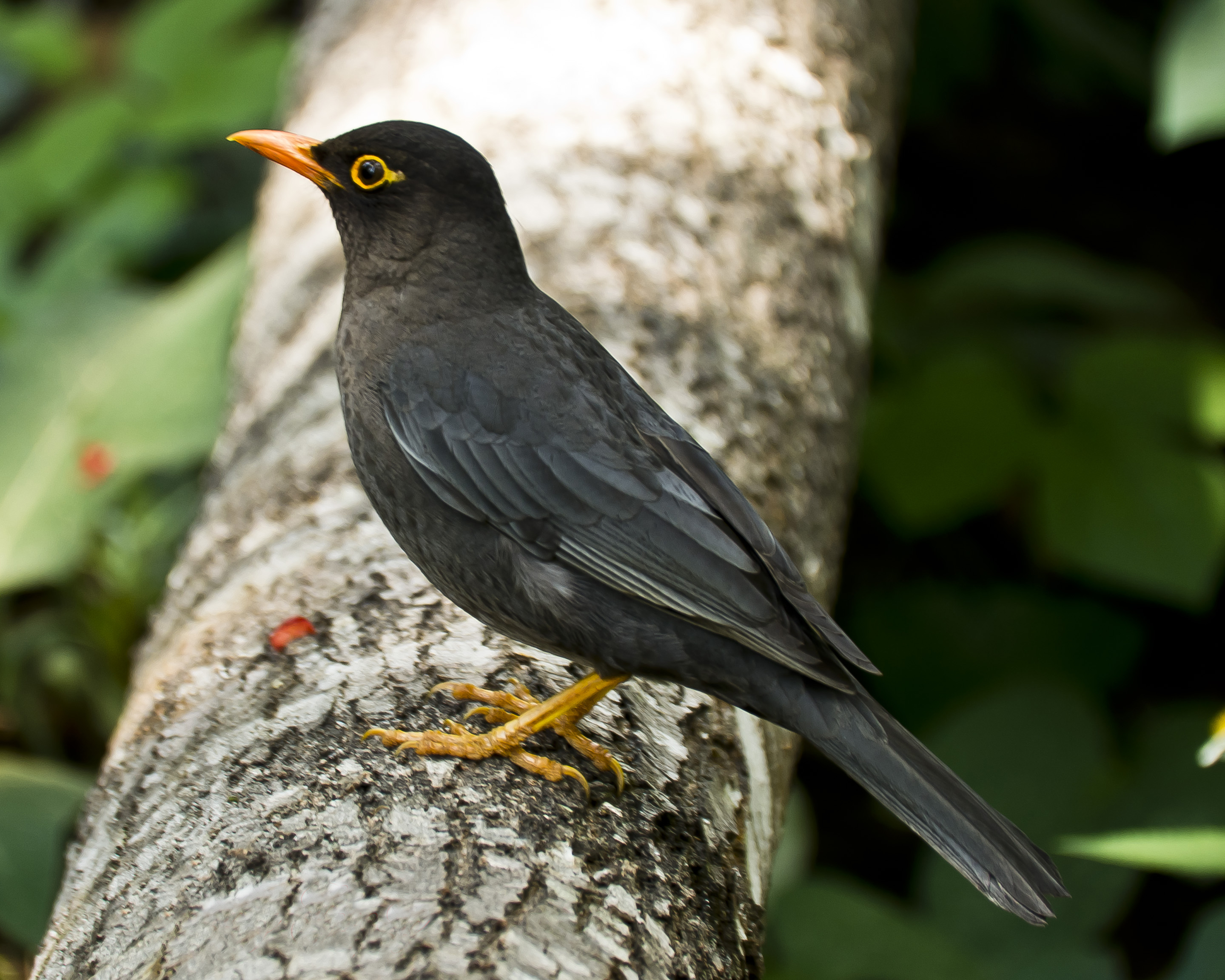 Indian Blackbird Turdus simillimus, male; Coonoor, Nilgiri Hills, Tamil Nadu, India